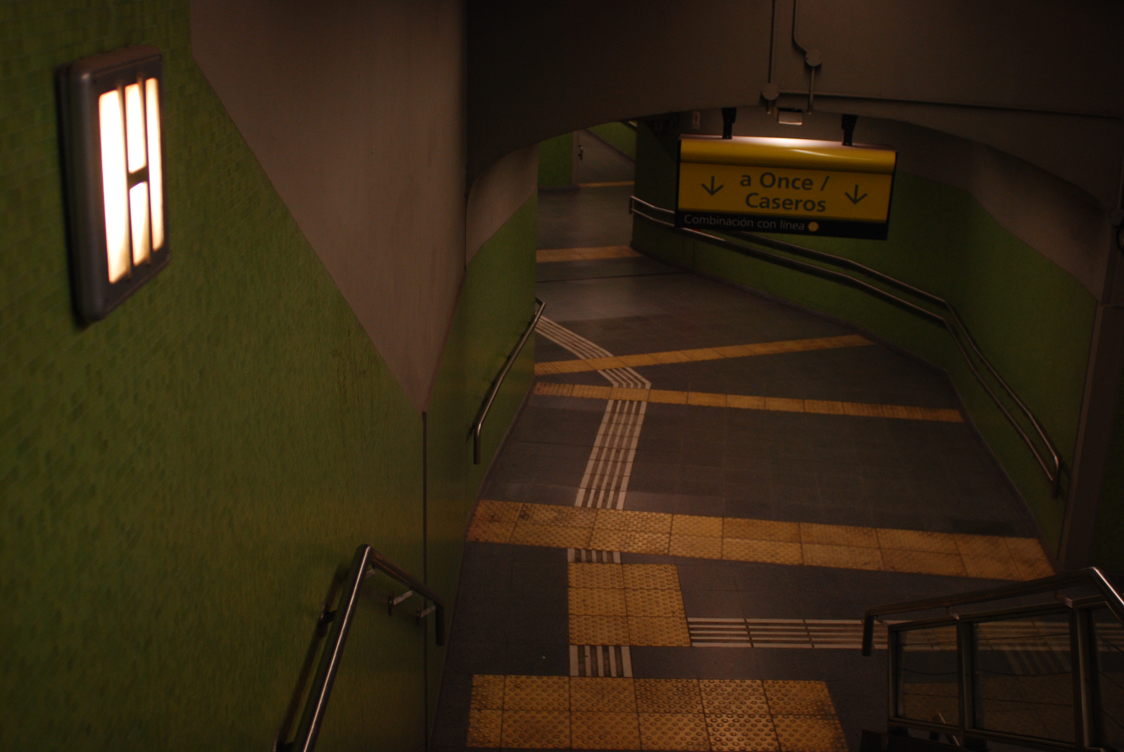 Línea H de subtes de Buenos Aires, pasillo para combinar con la línea A en estación Once (Argentina, noviembre 2008)